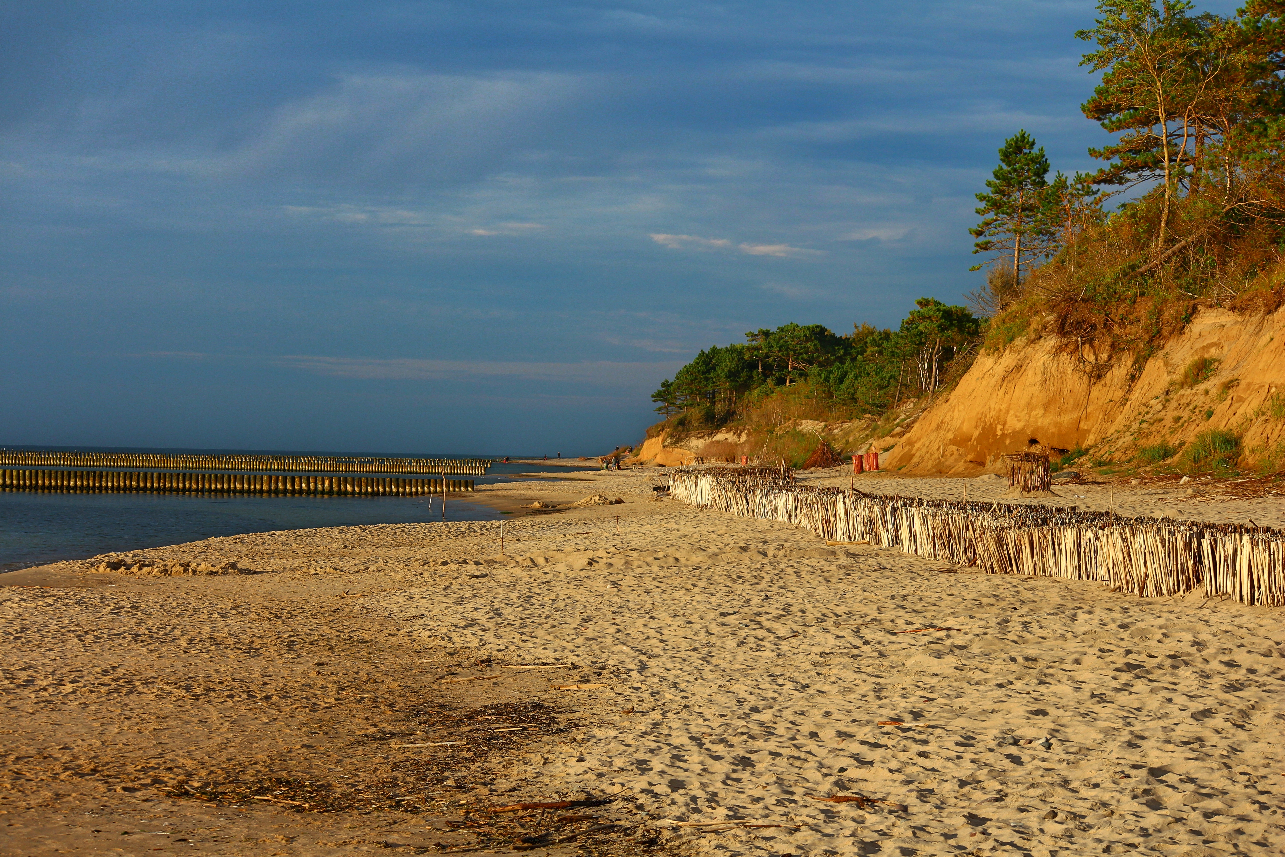 Plaża Wicie sierpień 2015